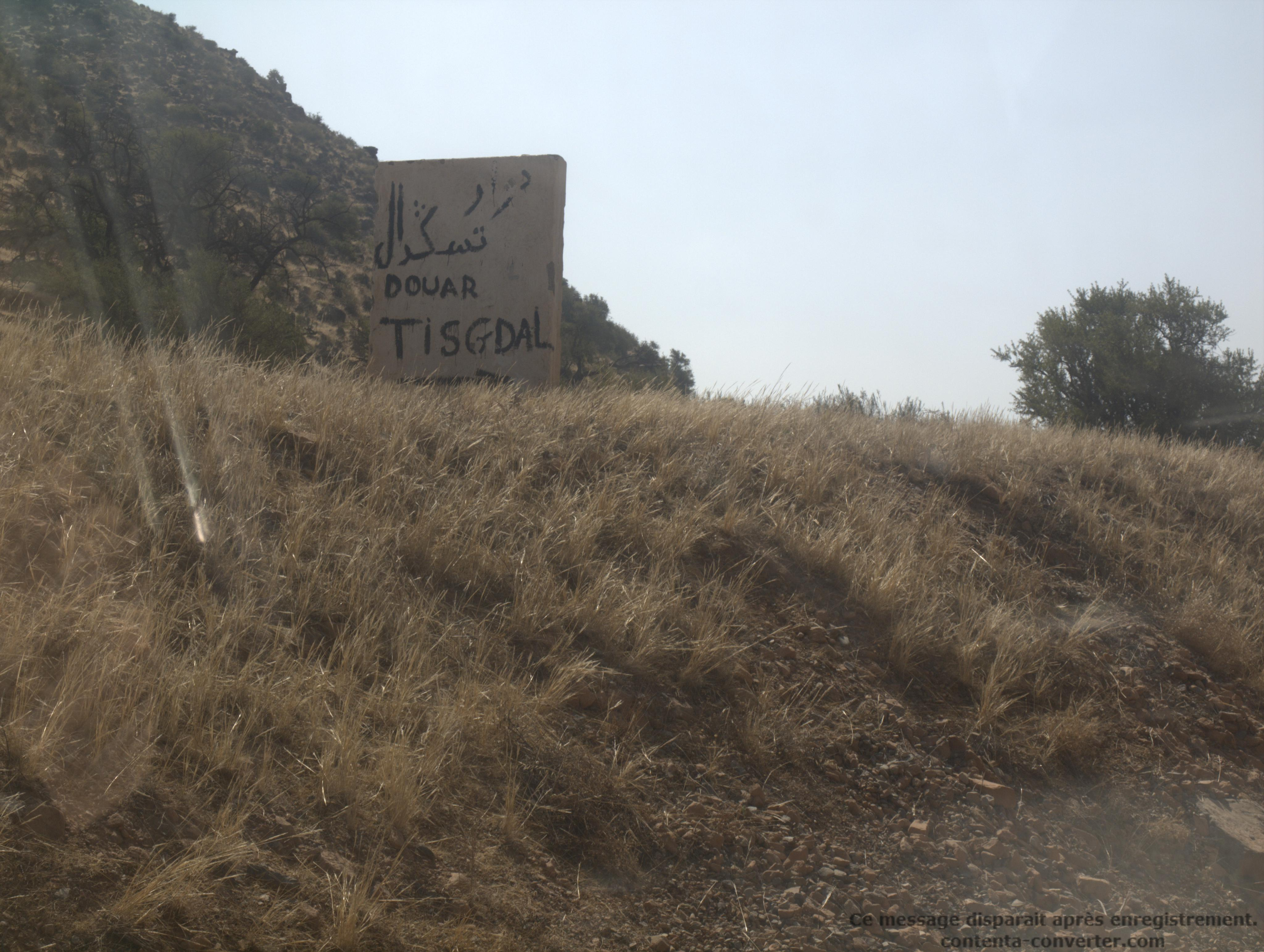 Tisgdal